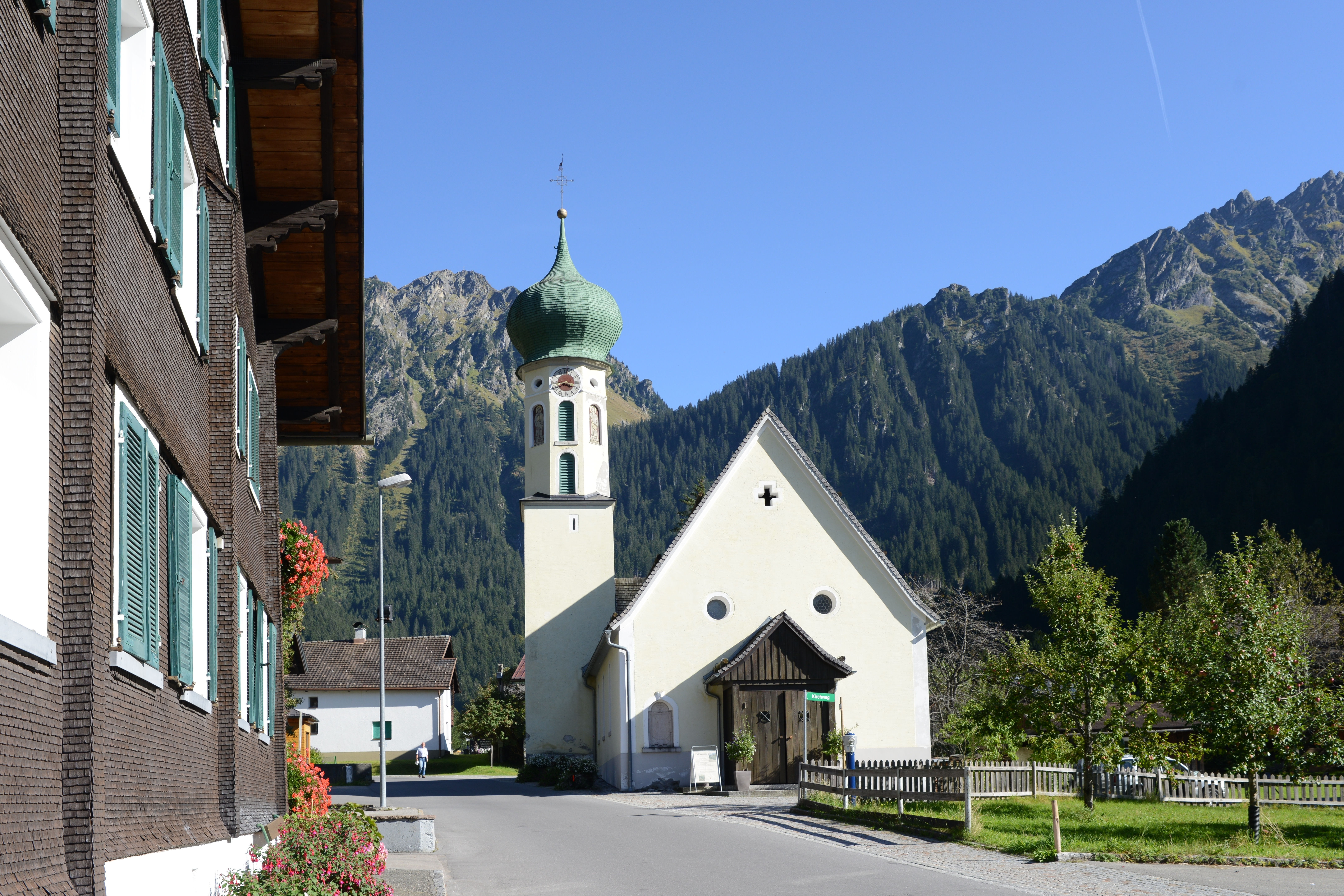 Kuratienkirche hl. Martin, in Partenen 91.